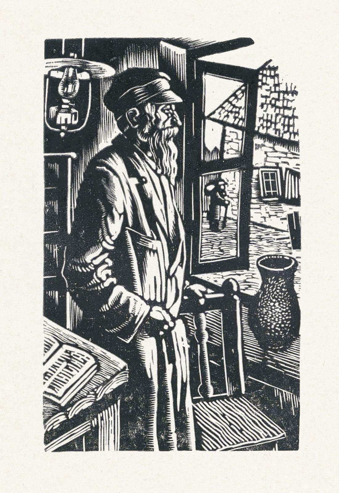 Старик у окна. Из цикла «Былое» Бумага, ксилография. 163х116 (115х72). Коллекция В.С. Геворкяна.